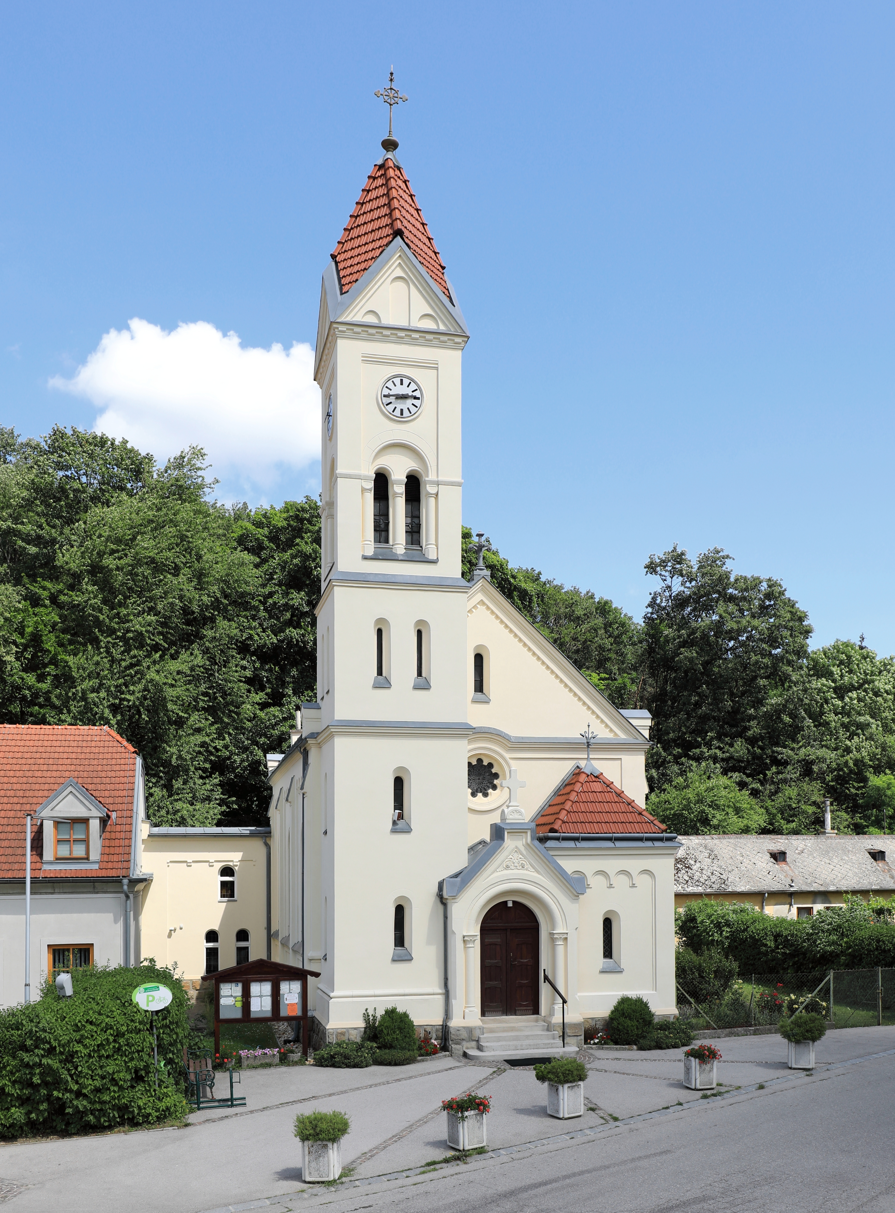 Westansicht der röm.-kath. Pfarrkirche Herz Jesu in der niederösterreichischen Gemeinde Wolfsgraben.Baubeginn war 1898. Aus finanziellen Gründen wurde der Bau eingestellt und erst 1907 durch den Orden der Kalasantiner mit Stadtbaumeister Johann Kernast fertiggestellt und geweiht. Die Saalkirche mit neoromanischen Formen hat einen eingezogenen Chor mit 5/8-Schluss sowie einen vorgestellten Nordwest-Fassadenturm.